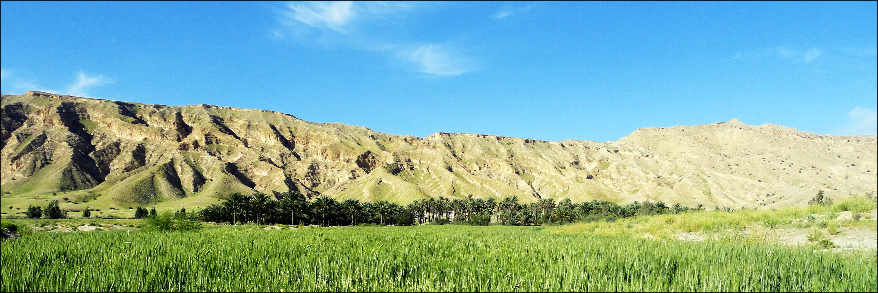 کوه پازنان در شمال غرب بخش علامرودشت در جنوب استان فارس